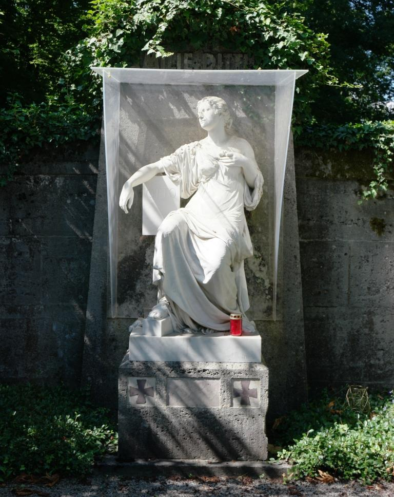 Grab des Bildhauers Emil Dittler (1868-1902) auf dem Pforzheimer Hauptfriedhof.